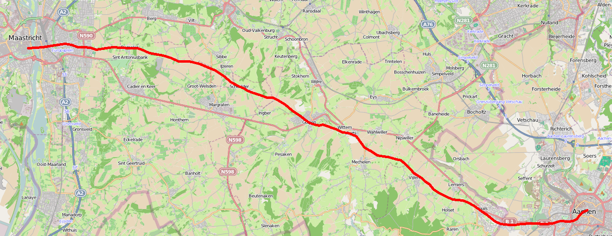 Reconstructie oude Akerweg, tussen Maastricht en Aken